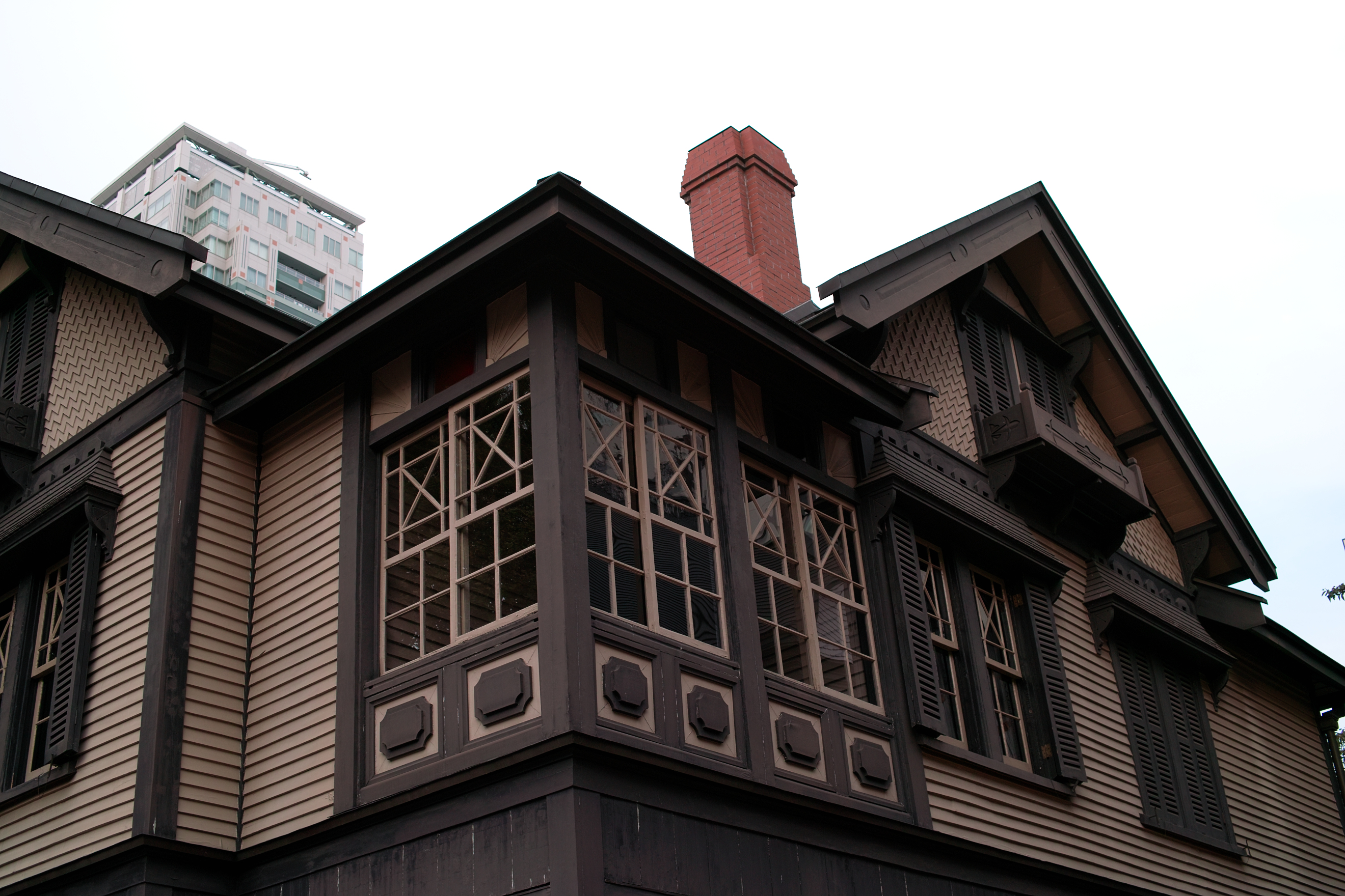 20101017-明治学院大学(Meiji Gakuin University)。インブリー館